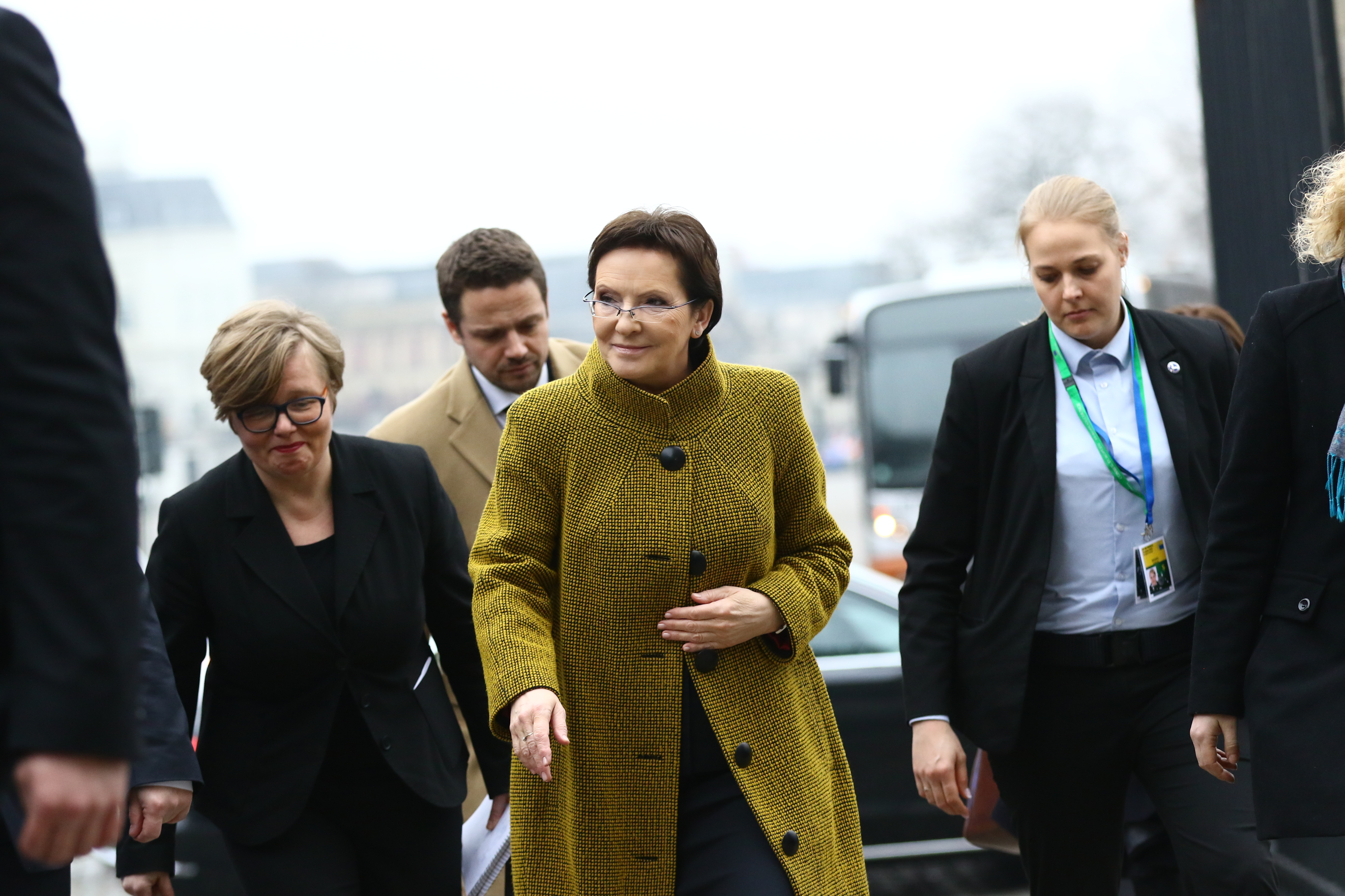 EPP Summit, March 2015, Brussels